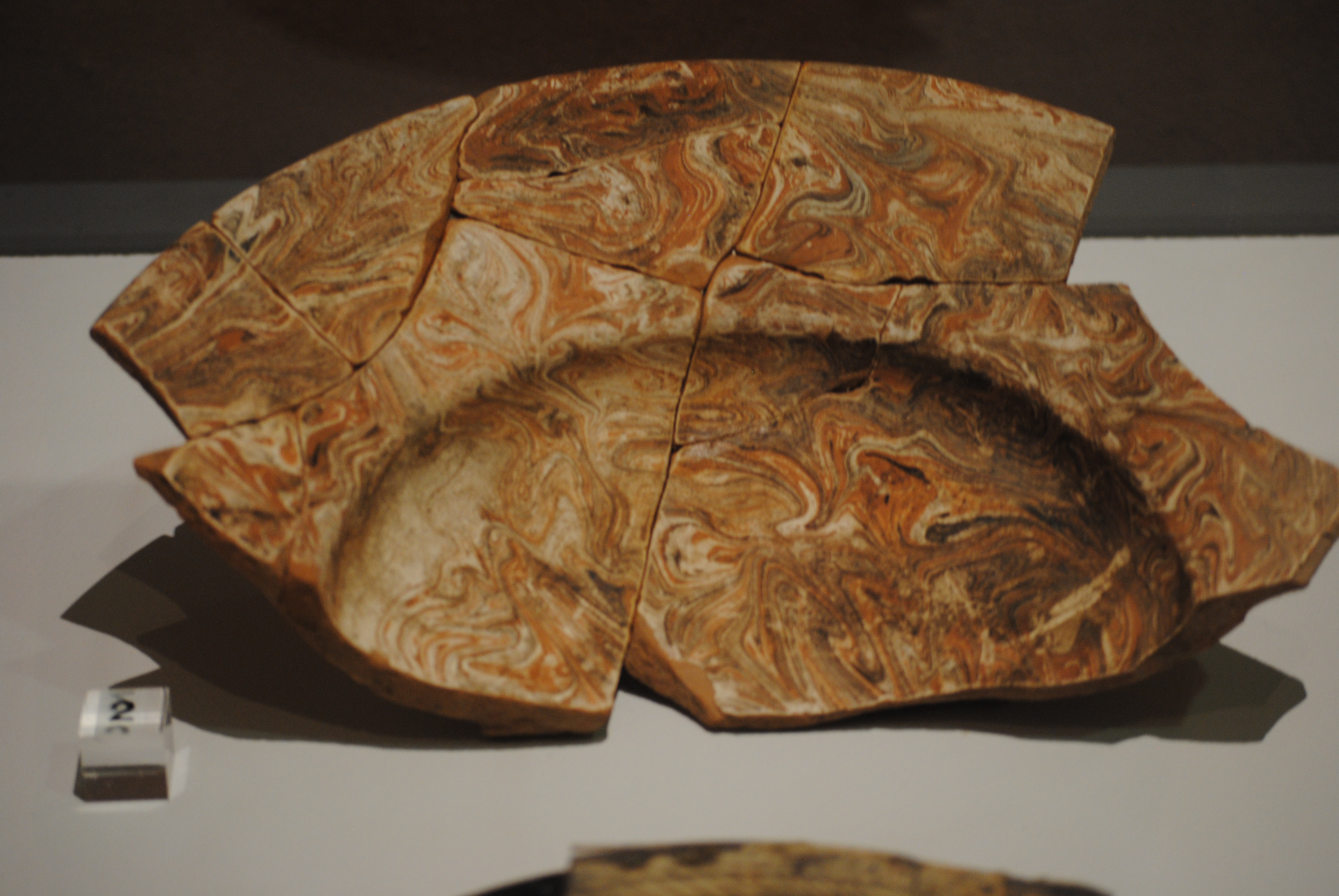 Scodella ingobbiata marmorizzata (scarto di prima cottura) risalente al XVII secolo (recuperata durante gli scavi di via Sapienza, Pisa) manifattura Bitozzi - Museo nazionale di San Matteo.